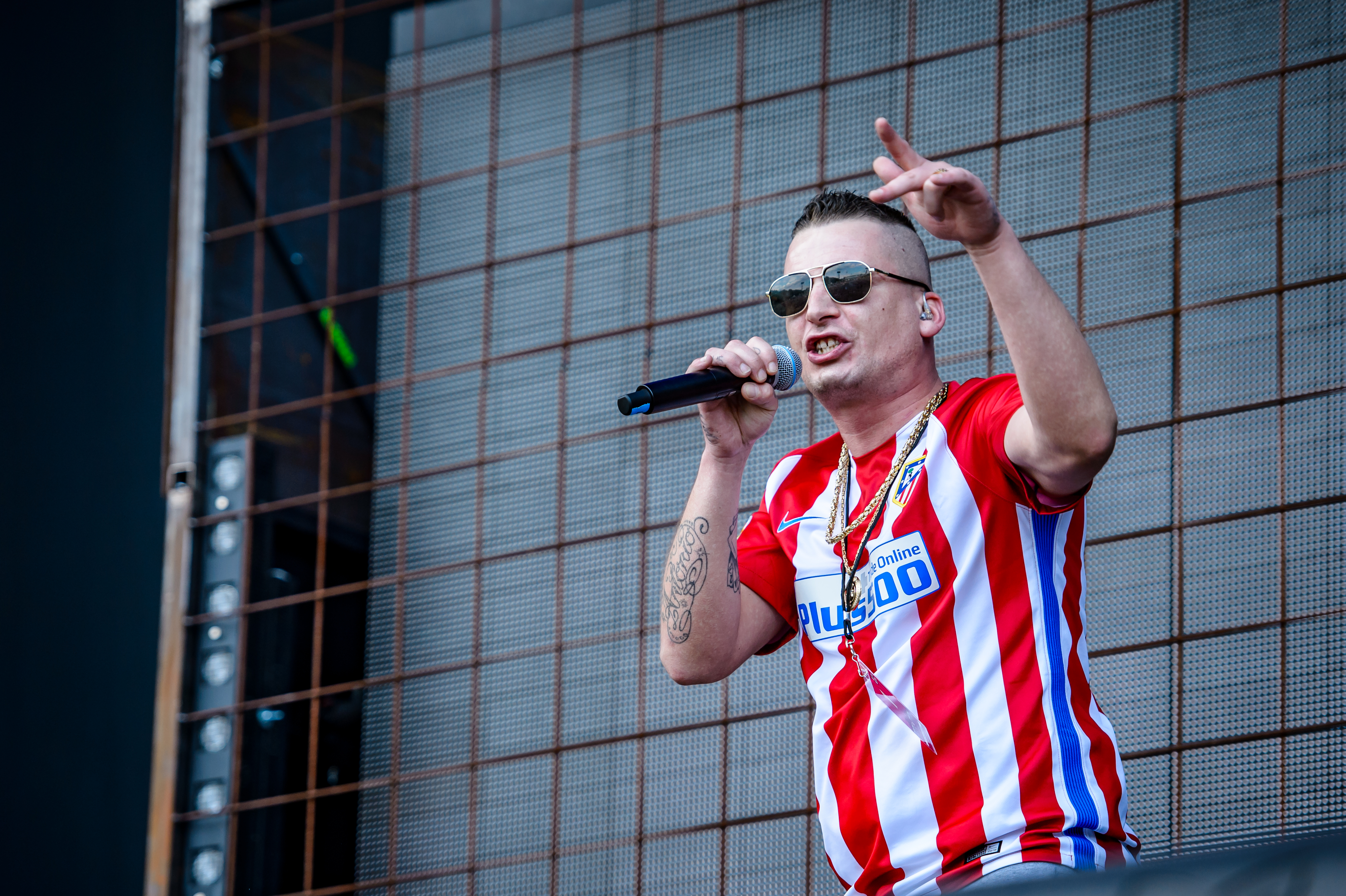 'Rock im Park 2017; Nürnberg': '187 Straßenbande'